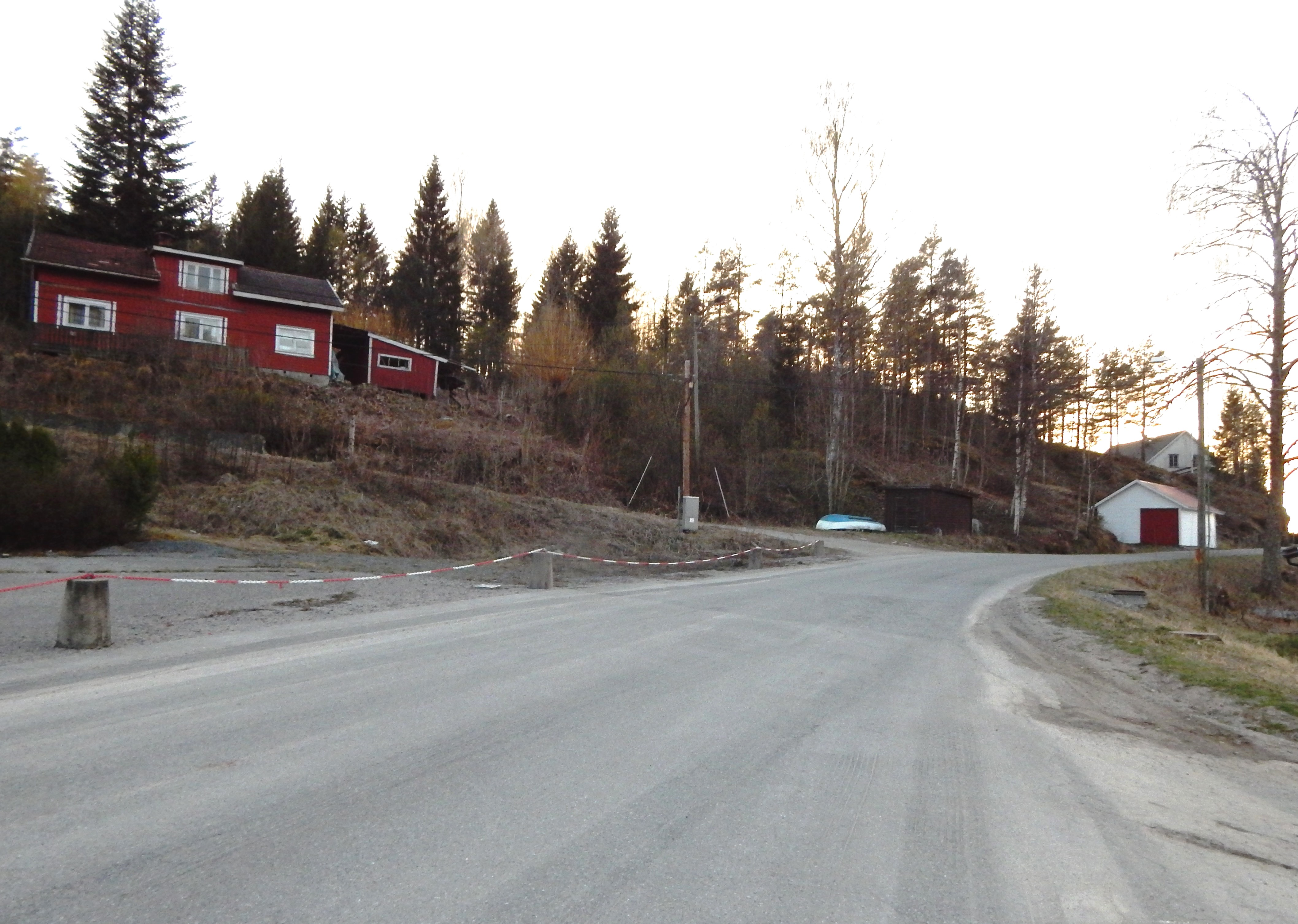 Høydalsvegen (fylkesvei 56) tar av fra Gisholtvegen (fylkesvei 356) sør for Kilevann.